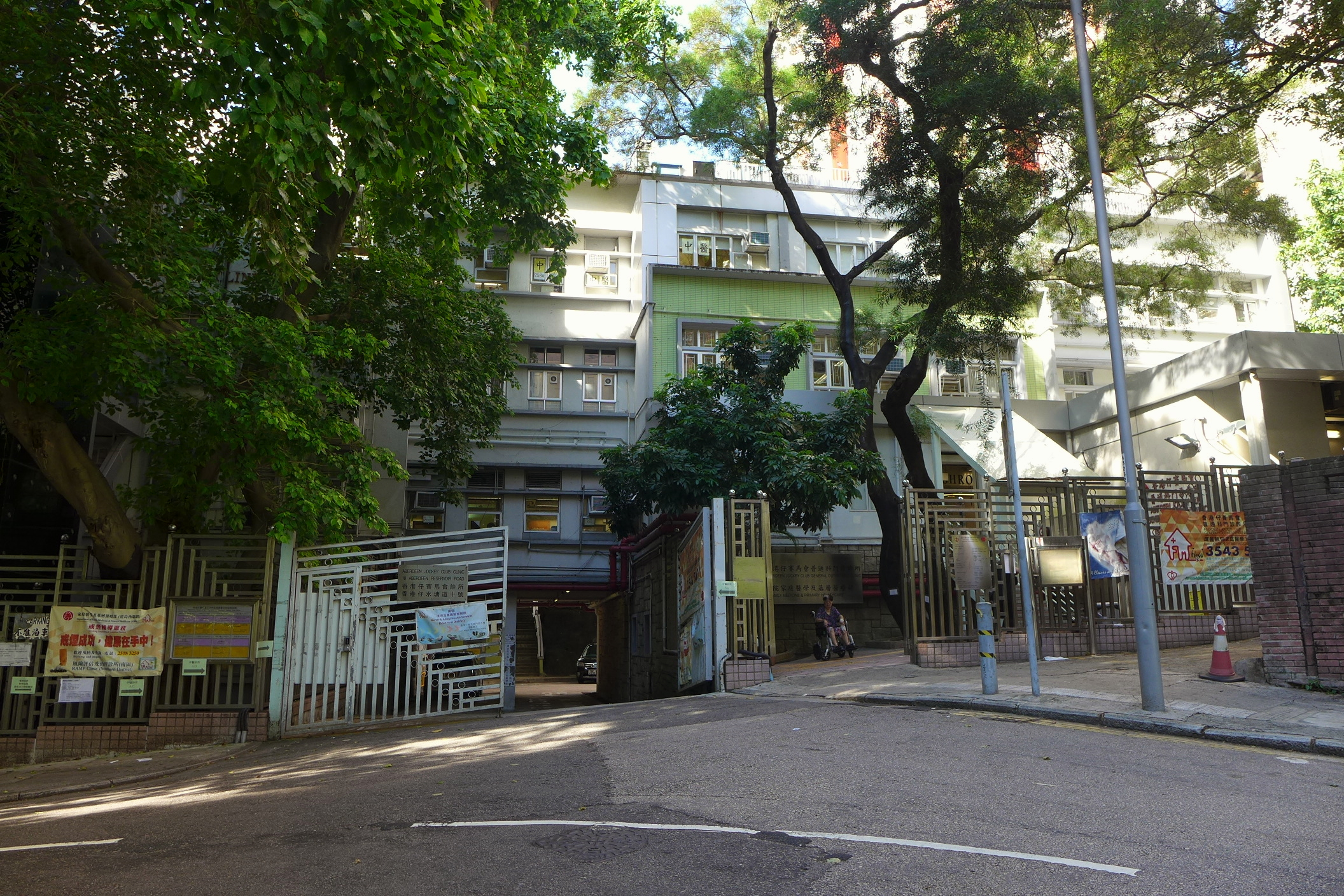 Aberdeen Jocket Club Clicnic